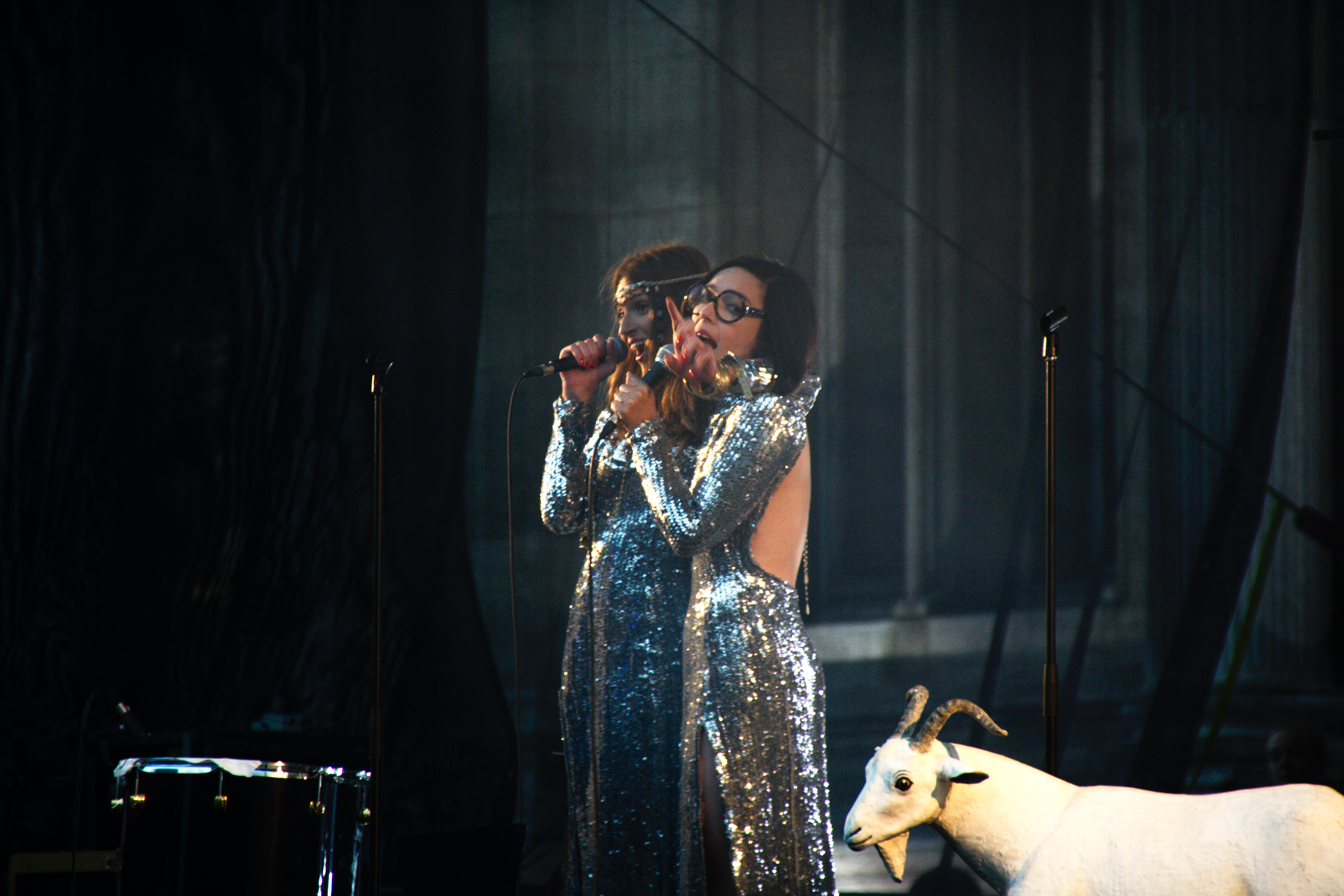 Concert Brigitte, 23 juillet 2011, Paris Plage, Festival Fnac Live